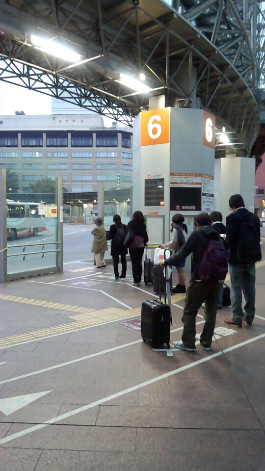 金沢駅東口バスターミナル6番のりば